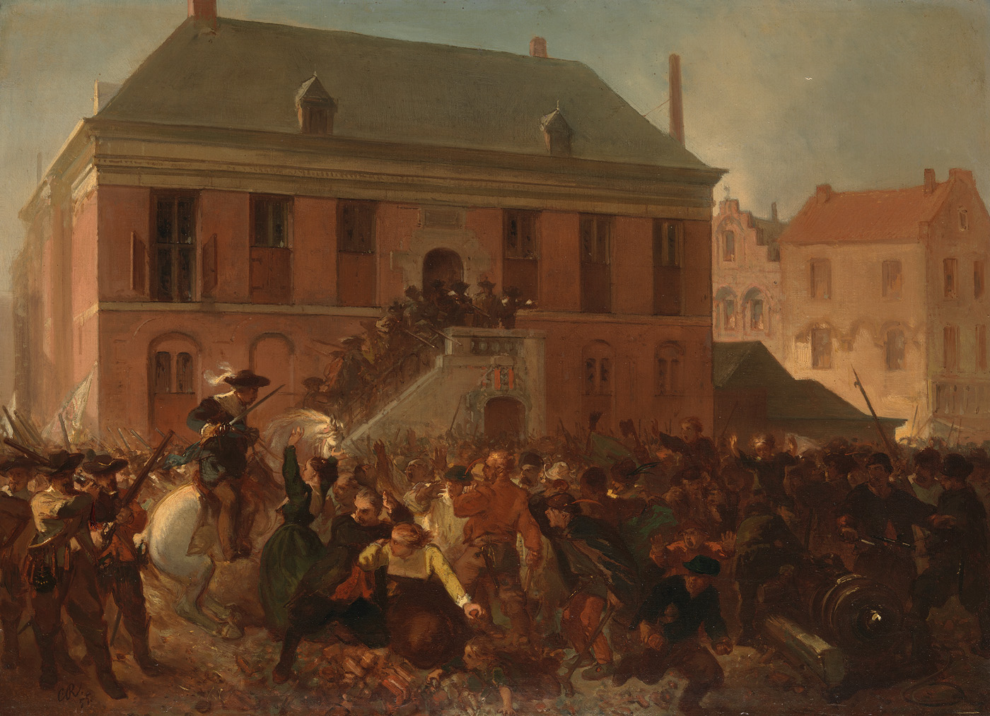 schilderij; tachtigjarige oorlog; Vos, Jacob de; geschiedenis (iconografie)